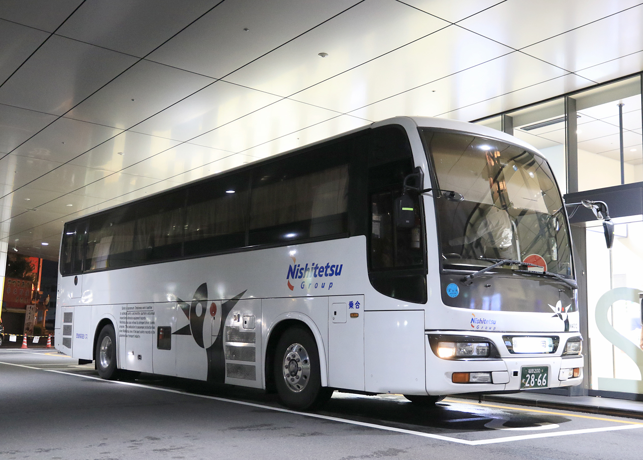 登録番号 福岡200か28-86 社番：4012 西鉄高速バス㈱福岡支社所属 夜行高速路線用車両 2015年9月18日 鹿児島中央駅（南国交通バスターミナル）にて撮影 撮影者 Zondag2000